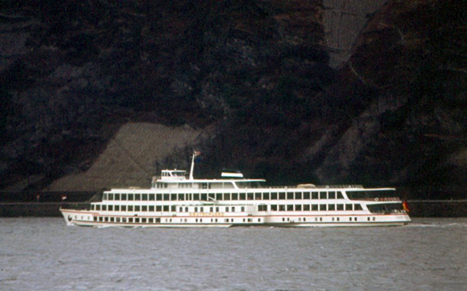 Passagierschiff Deutschland (später Wappen von Mainz) auf dem Rhein in der Nähe von St. Goar.